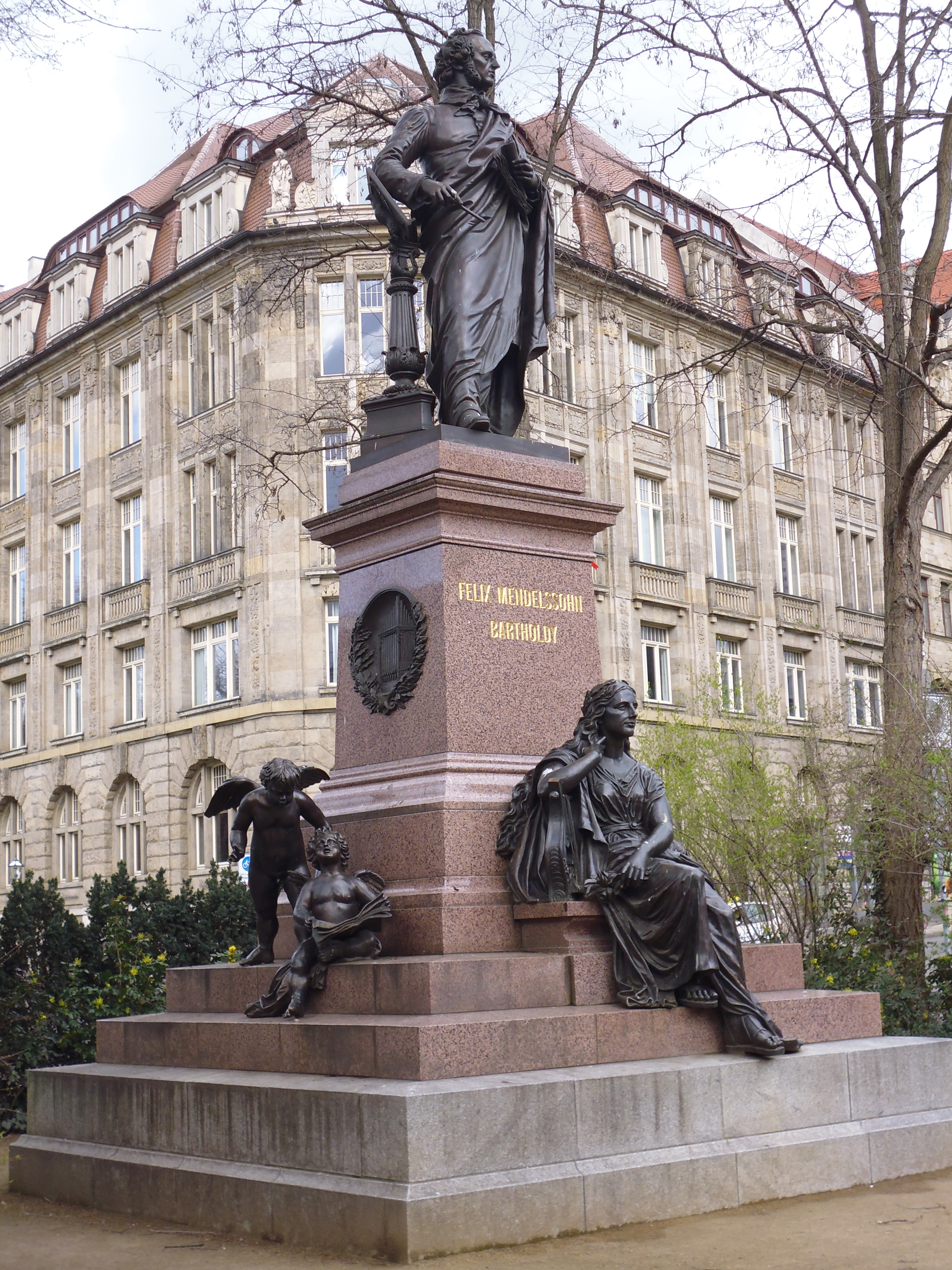 Mendelssohn-Denkmal in Leipzig im Jahr 2012